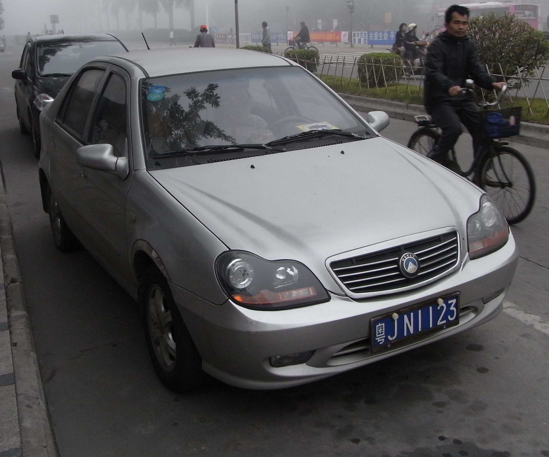 新會會城 早晨的zh:霧 岡州大道中 吉利汽車